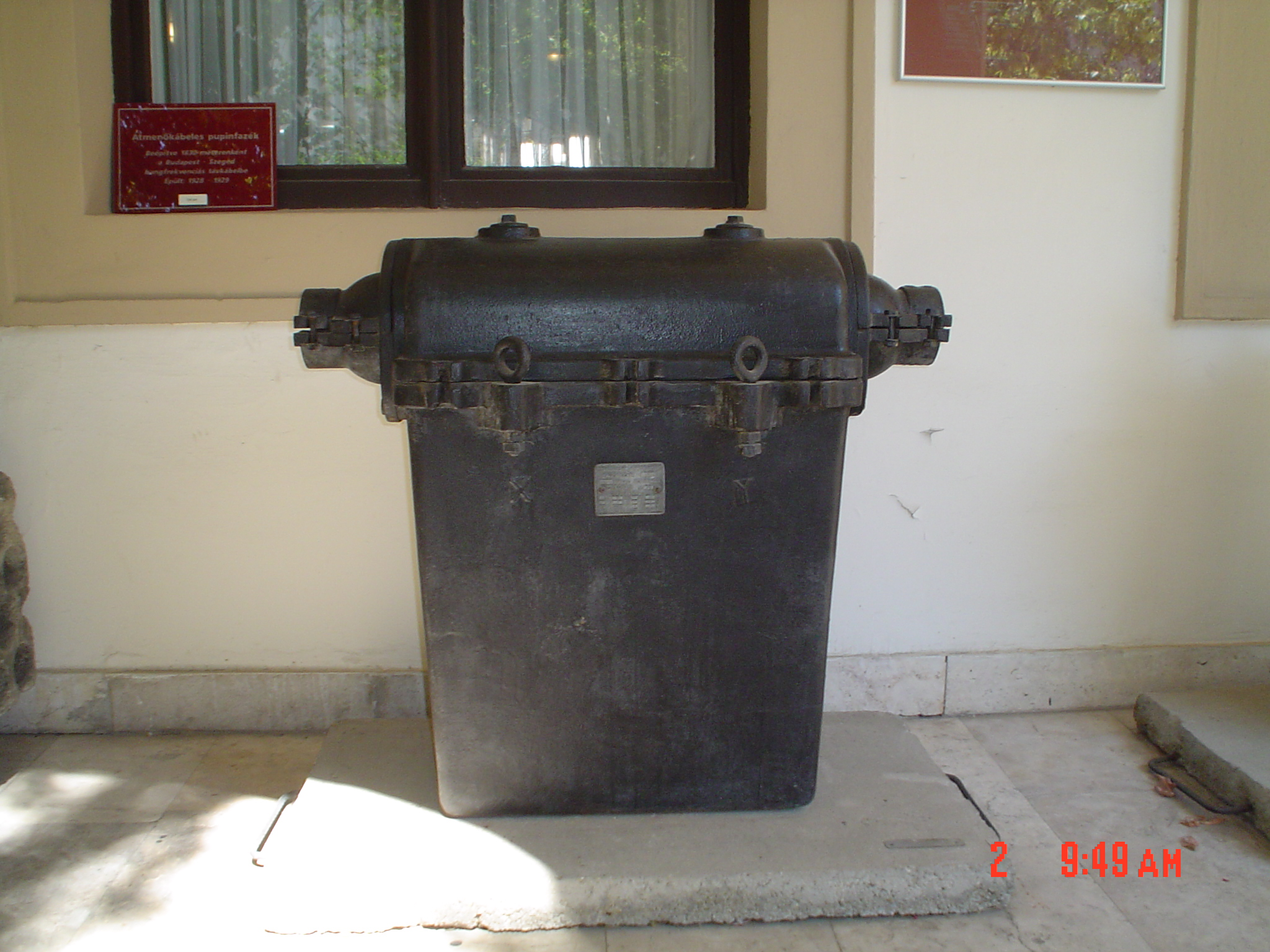 Átmenőkábeles pupinfazék (Telefónia múzeum, Budapest)